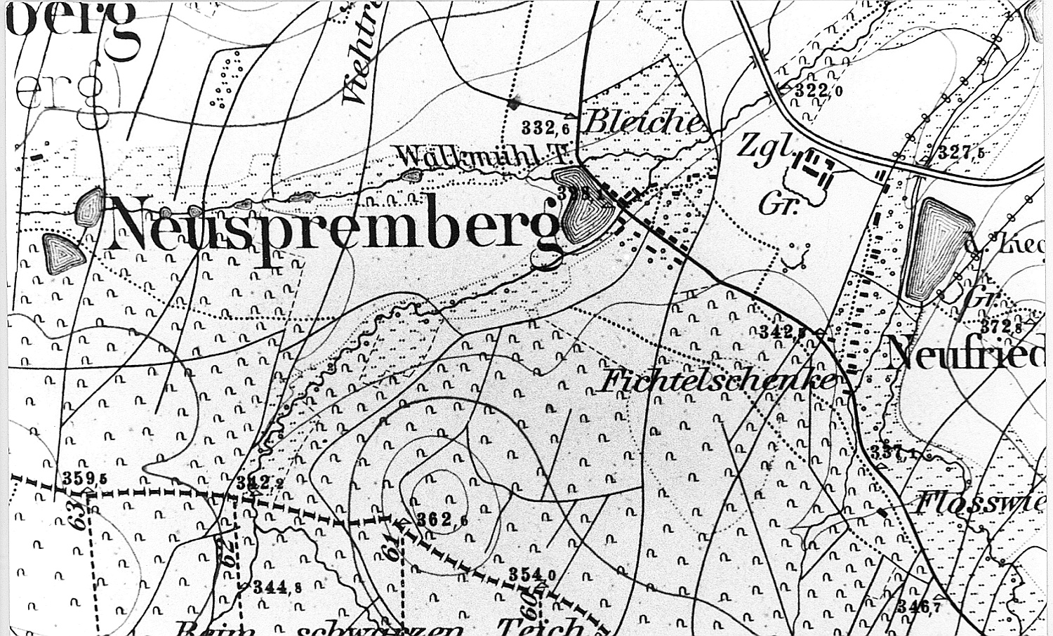 Original image description from the Deutsche Fotothek Neusalza-Spremberg. Meßtischblatt, Sekt. Neusalza, 1883